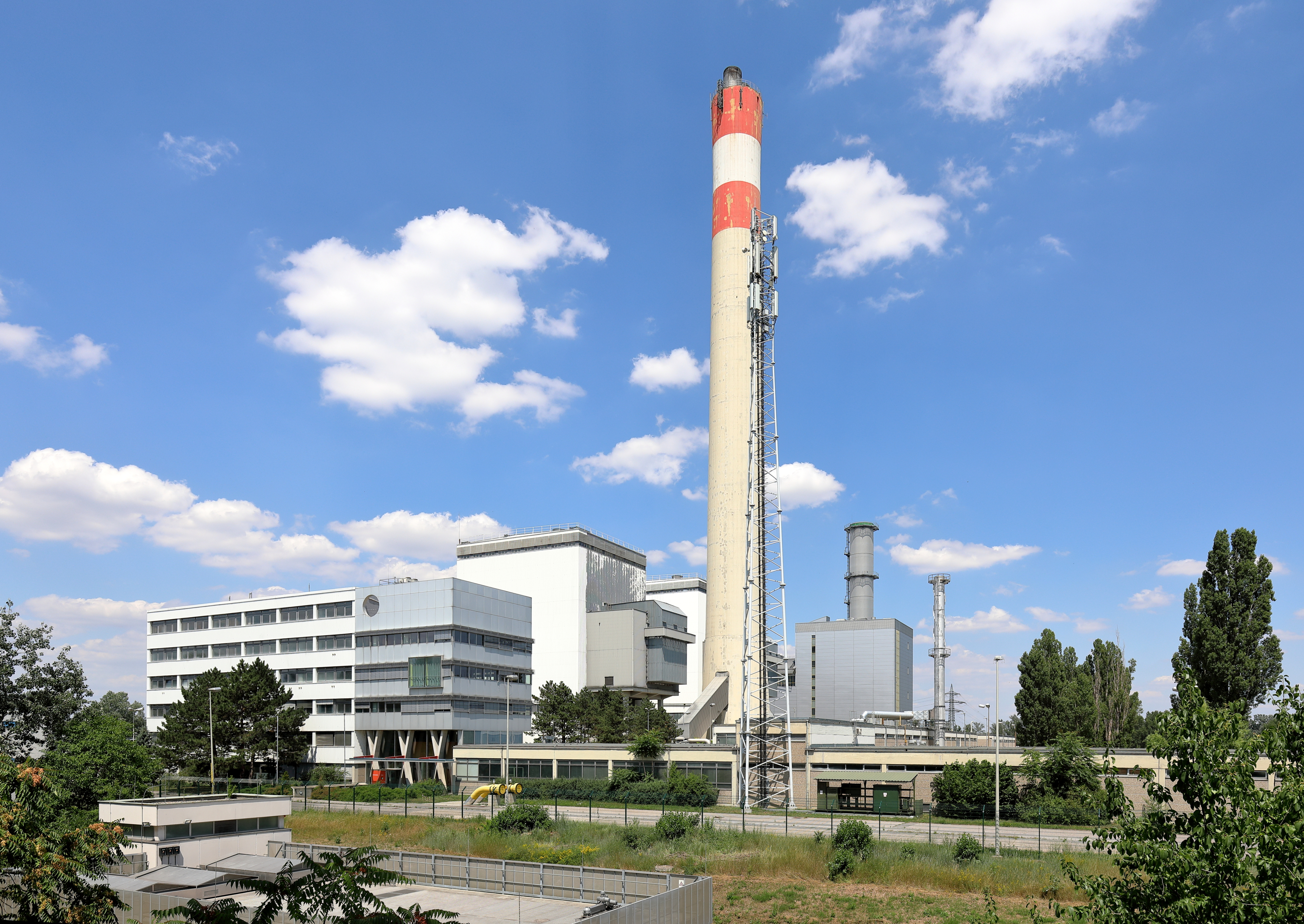 Südsüdwestansicht des Kraftwerkes Donaustadt im 22. Wiener Bezirk Donaustadt mit Verwaltungs- und Nebengebäuden sowie Block 1 & 2 im Vordergrund und Block 3 (grau) im Hintergrund. Die Inbetriebnahme des Krafwerkblocks 1 fand 1973 und die des Blocks 2 im Jahr 1975 (je 162.000 Kilowatt) statt. In den 1980er Jahren wurde eine katalytische Entstickungsanlage eingebaut. Aufgrund hoher Erhaltungskosten und geringer Wirkungsgrade erfolgte im Jahr 1999 bzw. im Jahr 2009 die Außerbetriebnahme der Blöcke 1 & 2. Der Kraftwerksblock 3, ein Kombiblock mit Gasturbine und Kondensationsentnahmedampfturbine sowie einer Kraft-Wärme-Kopplung, wurde im November 2001 in Betrieb genommen und verfügt über eine elektrische Leistung von über 350 MW sowie eine Fernwärmeleistung von bis zu 250 MW.